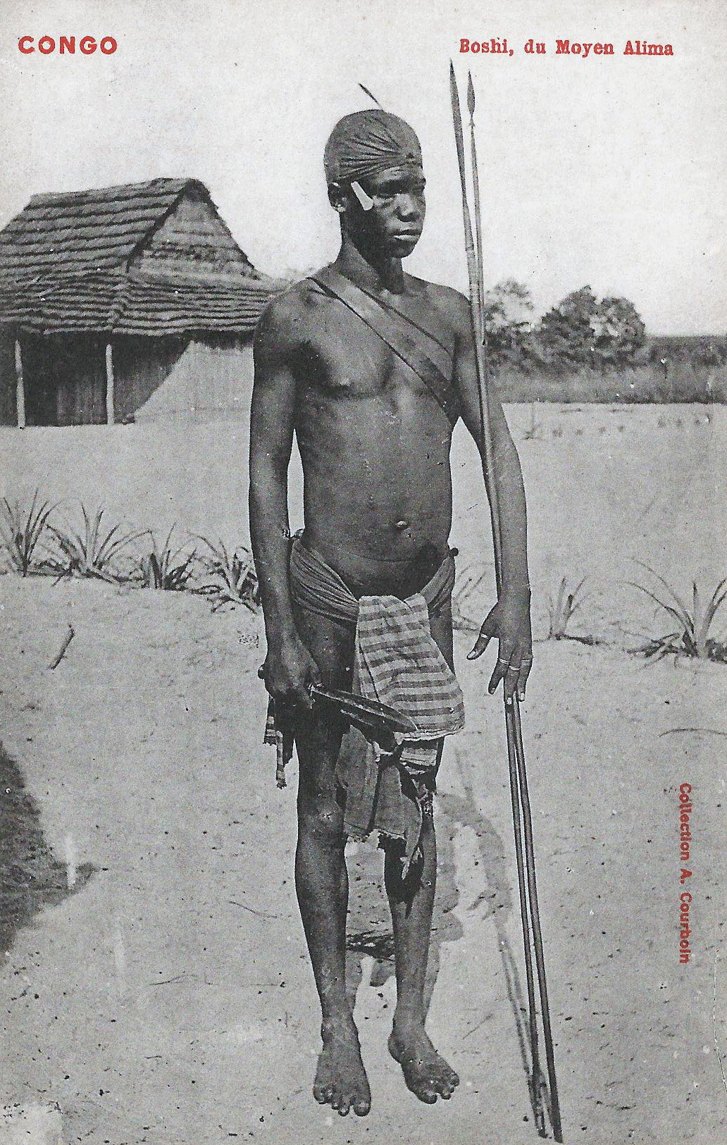 Boshi du moyen Alima. Collection A. Courboin Congo